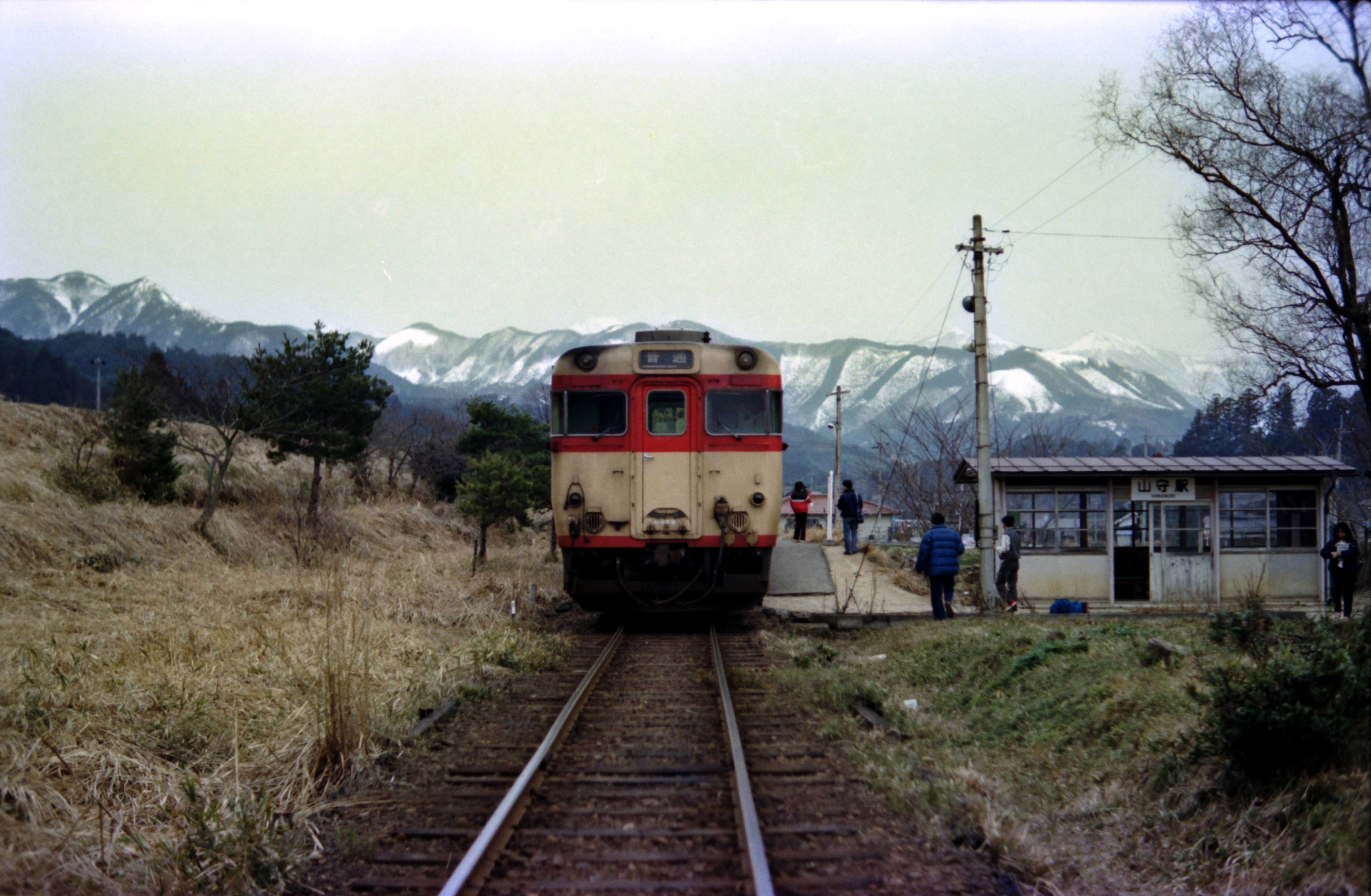 国鉄 倉吉線 山守駅 Ｓ５６頃